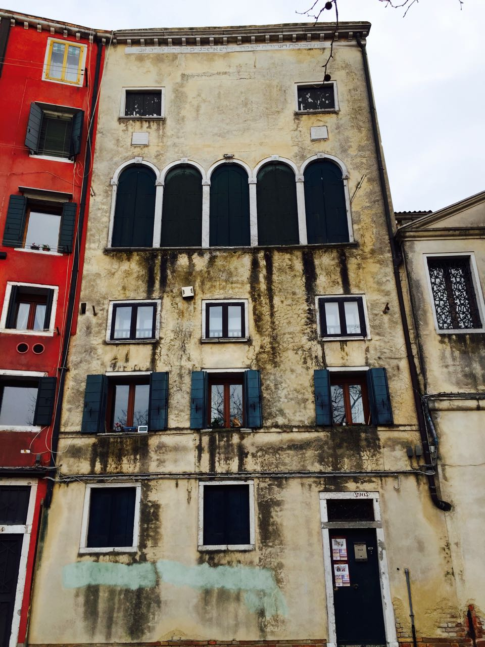 Velká německá synagoga v Benátkách